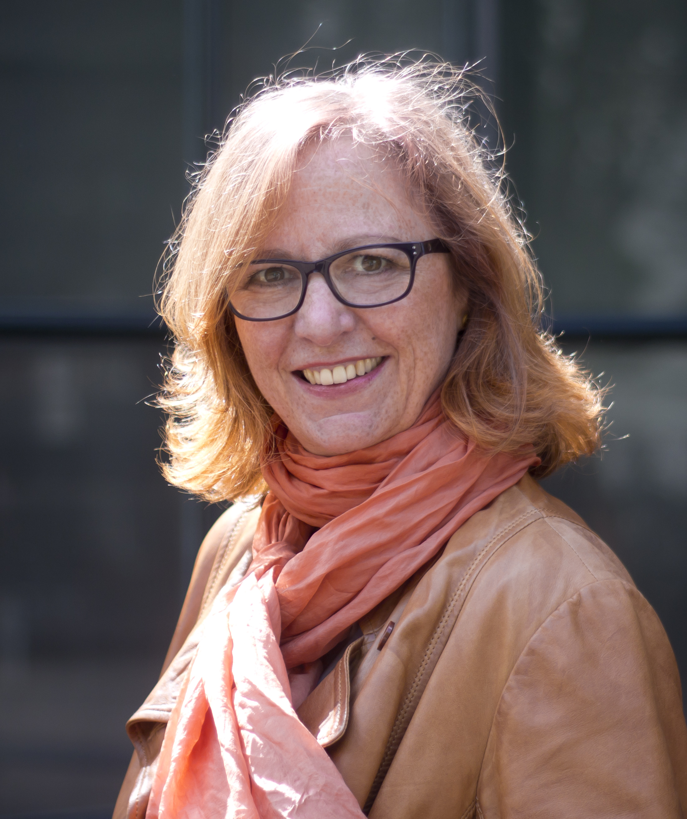 Claudia Schreiber, deutsche Schriftstellerin